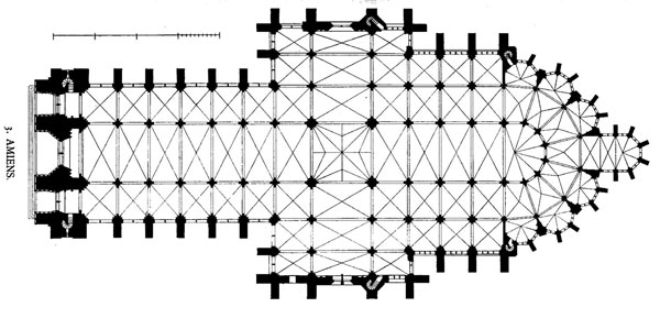 Amiens. Floorplan, from G. Dehio and G. von Bezold, Die Kirchliche Baukunst des Abendlandes, Stuttgart, 1887-1902, plate 363 Lithograph